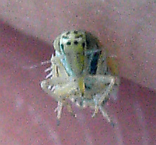 Ligurische Blattzikade (Eupteryx decemnotata), Kopf von vorne